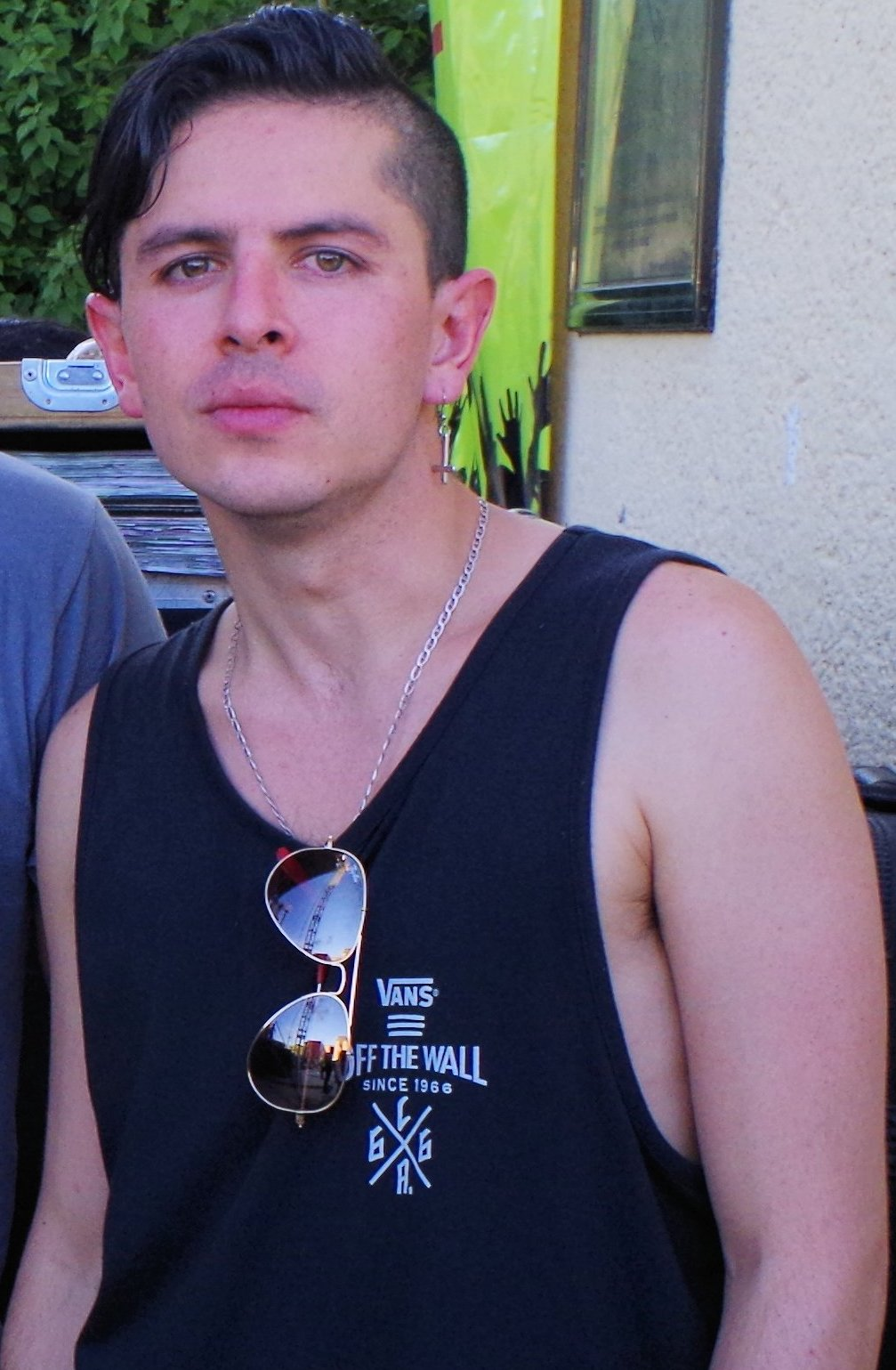 Mikky Lafey y Allison, la banda de Pop-punk mexicana que encabezo el line-up del RockCoahuila 2014. Foto: Alfie, Mikky, Fear y Erik Canales.